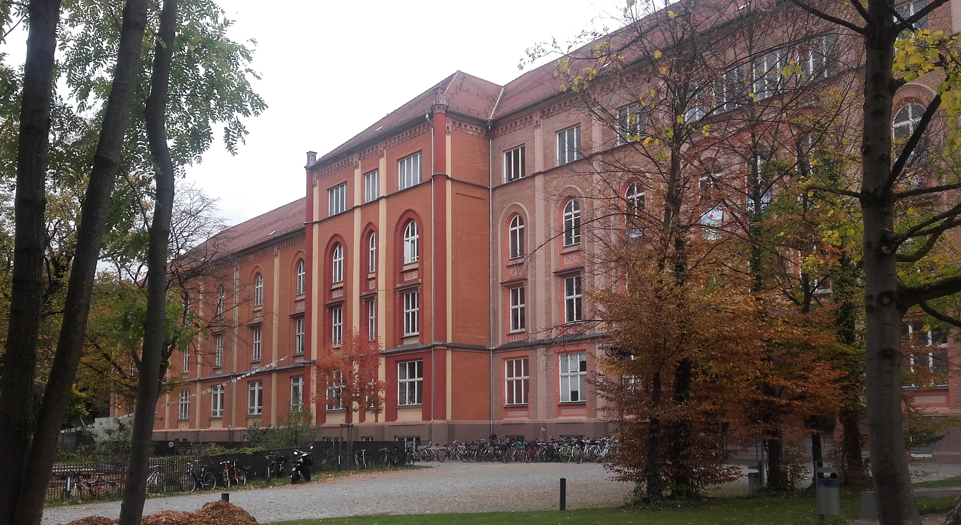 Blick auf die Südseite des Alten Hauptkrankenhauses in Augsburg